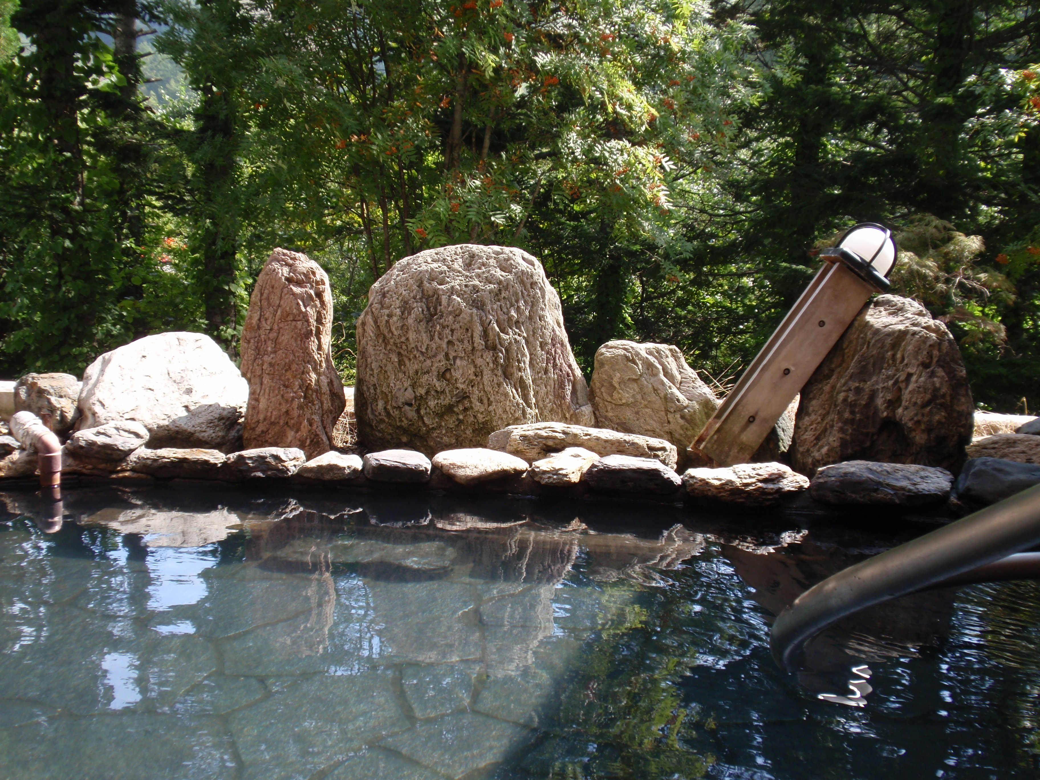 北海道今金町、美利河温泉クアプラザ美利河の露天風呂